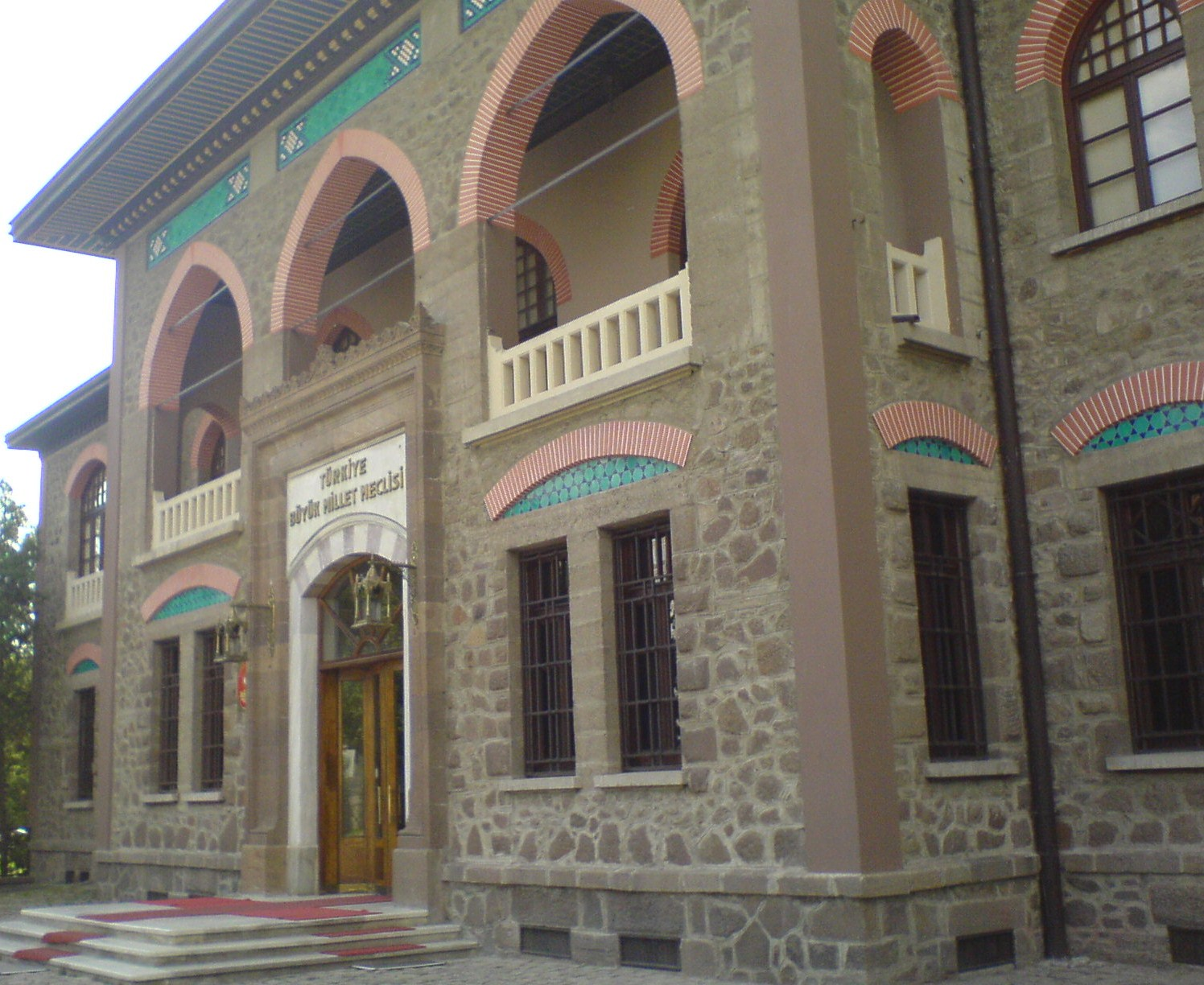 II. TBMM Binası Ankara